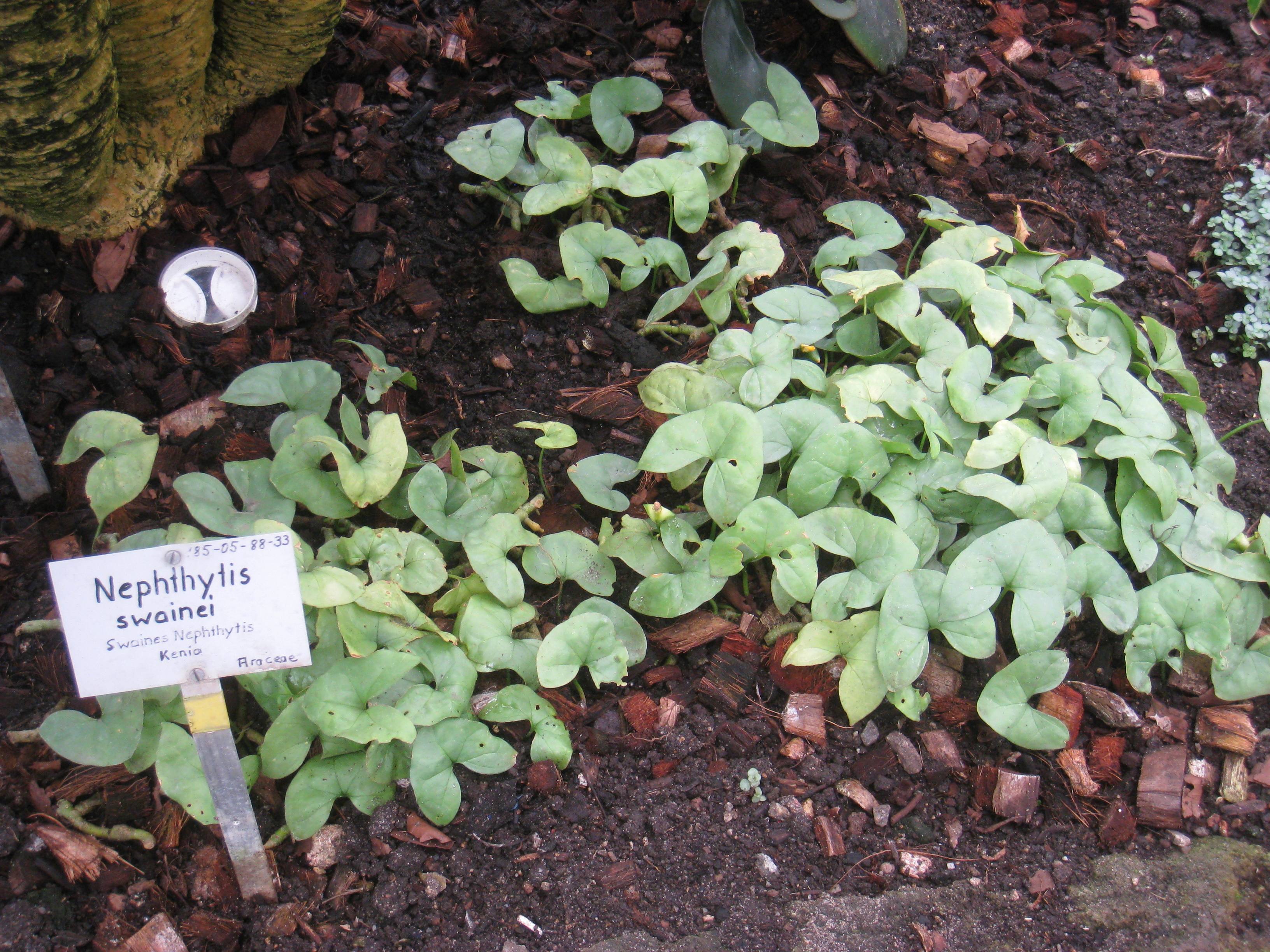 Nephthytis swainei specimen in the Botanischer Garten, Berlin-Dahlem (Berlin Botanical Garden), Berlin, Germany.